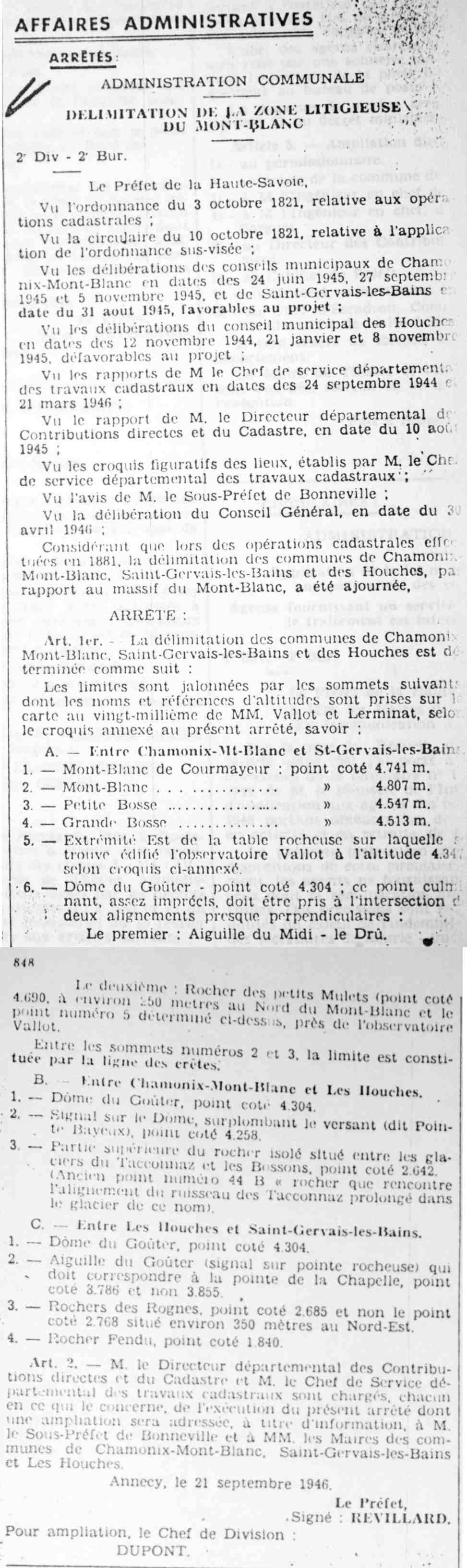 Le texte de l'arrêté du préfet de la Haute-Savoie daté du 21 septembre 1946 et délimitant la propriété communale du sommet du Mont-Blanc.